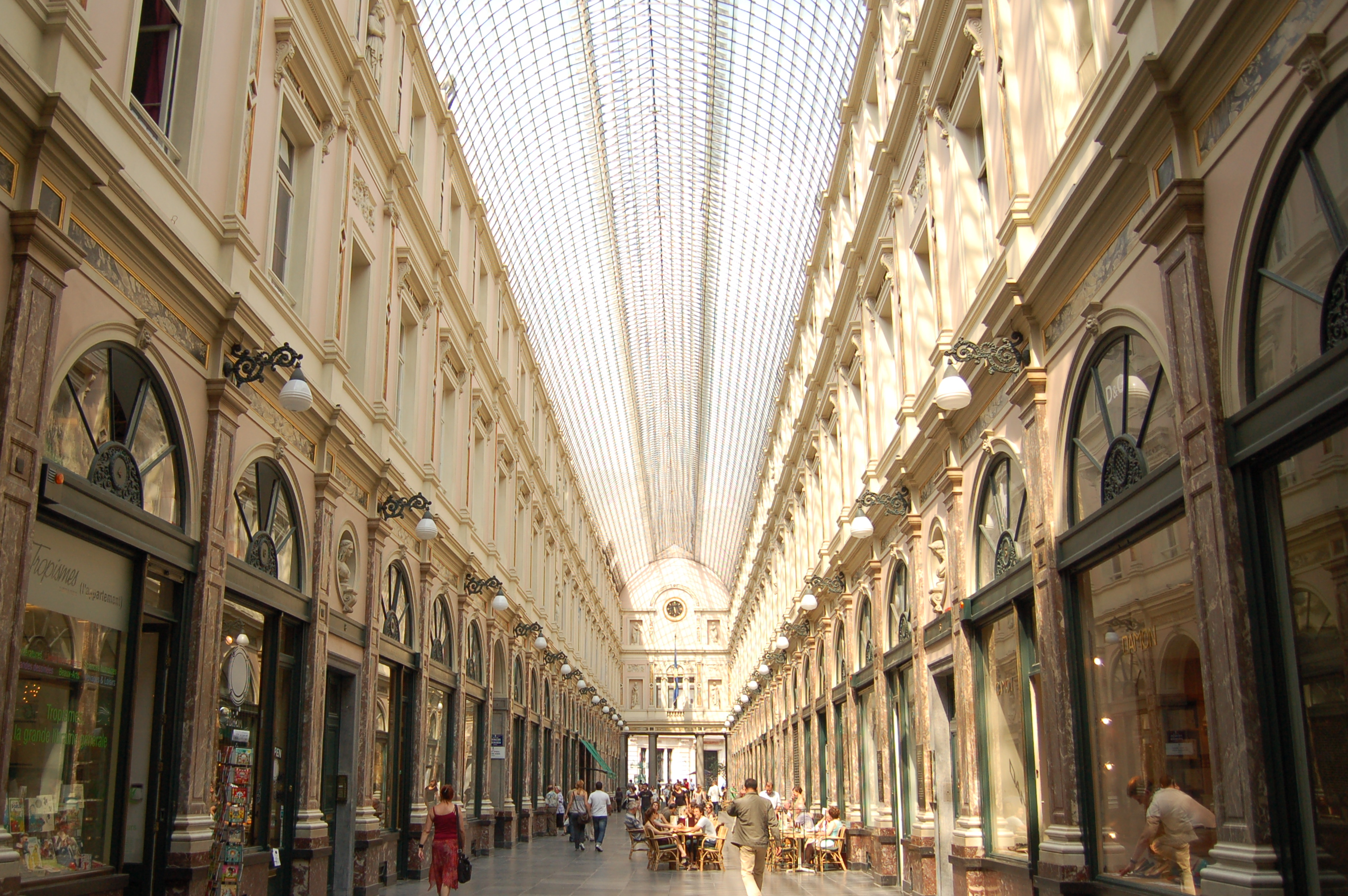 Ilot sacré de Bruxelles